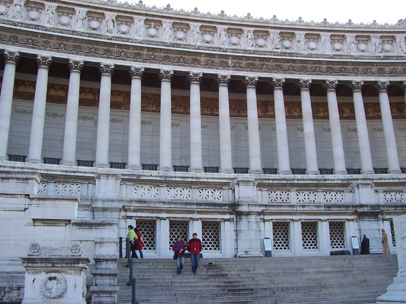 Roma - Vittoriano